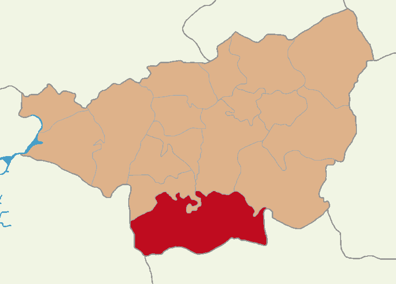 Çınar ilçesinin konumu